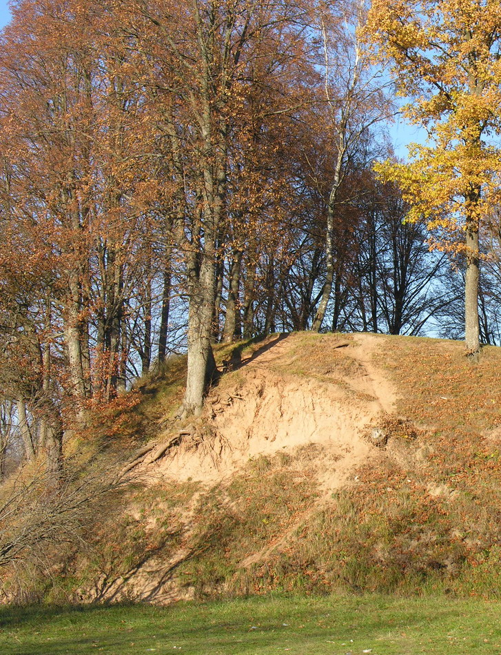 Nuošliauža. Nuslinkęs Daubarių piliakalnio I (Mažeikių raj., Tirkšlių sen.) šlaitas į Viešetės upės slėnį. Foto: Algirdas, 2005 m. spalio 31 d.